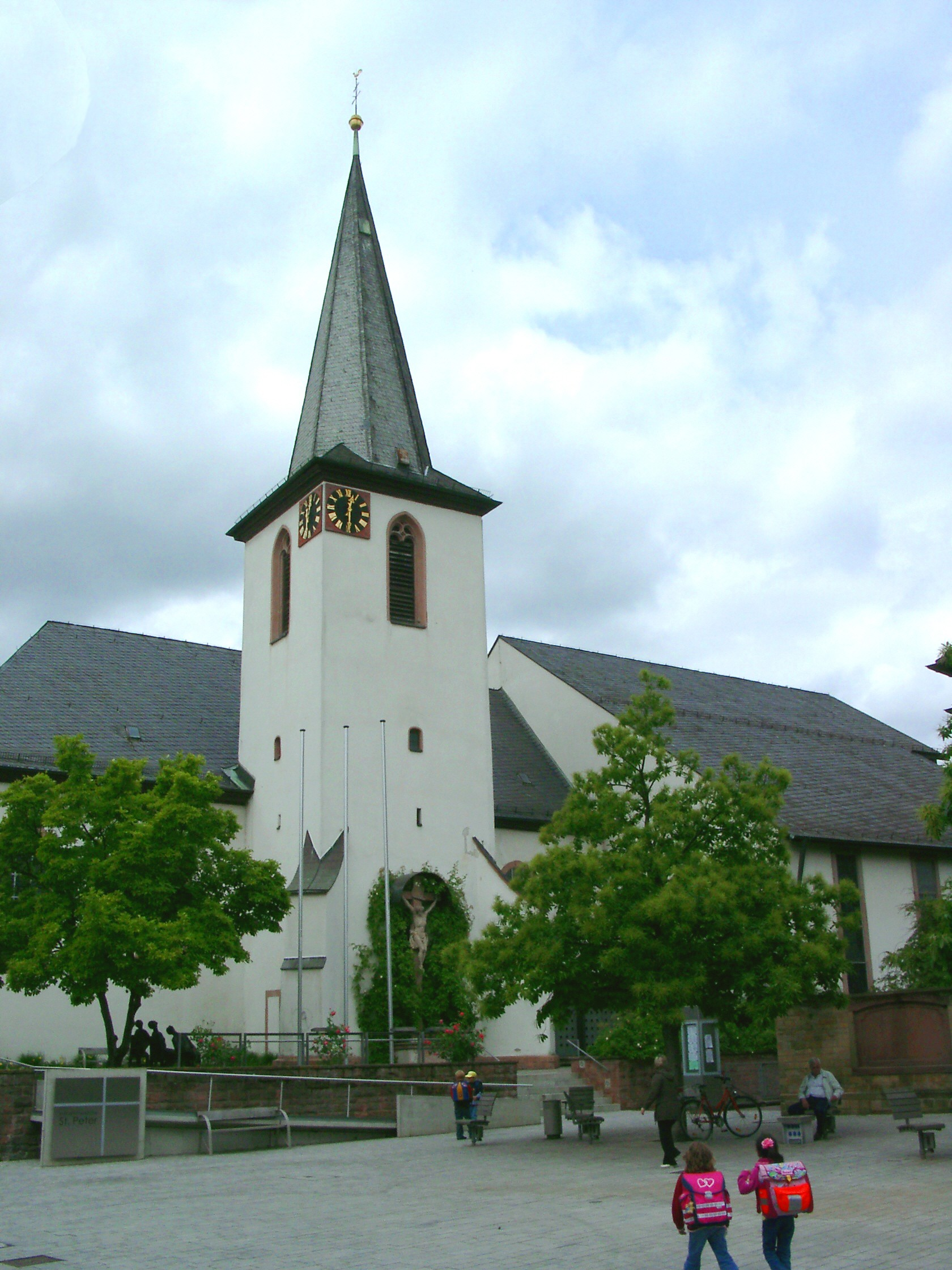 Walldorf (Baden), Katholische Kirche